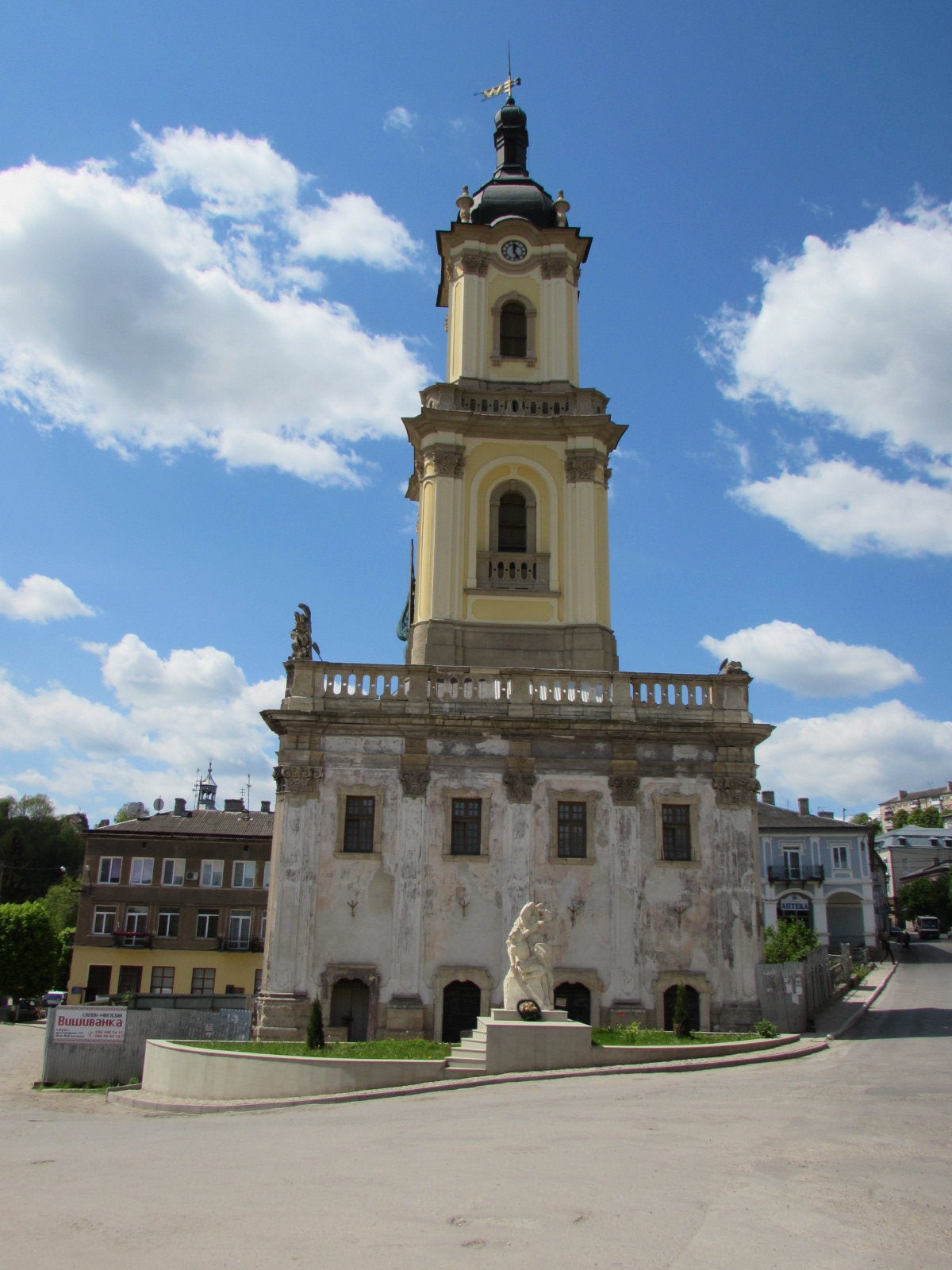 Ратуша (мур.), Бучач, майдан Волі